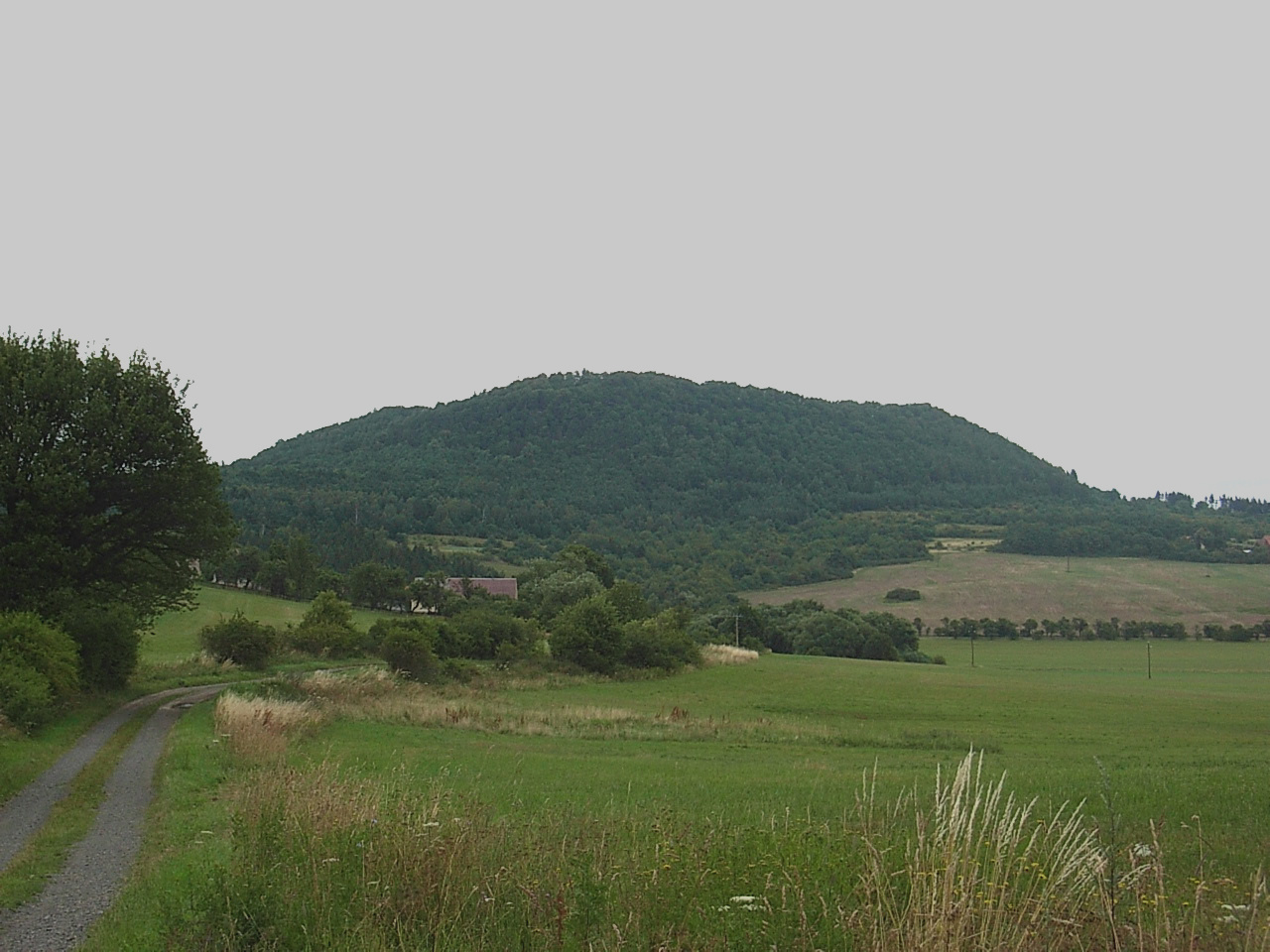 Pohled na vrch Vladař od jihozápadu, přes Kolešov. Zcela při pravém okraji pod obzorem Vladořice.